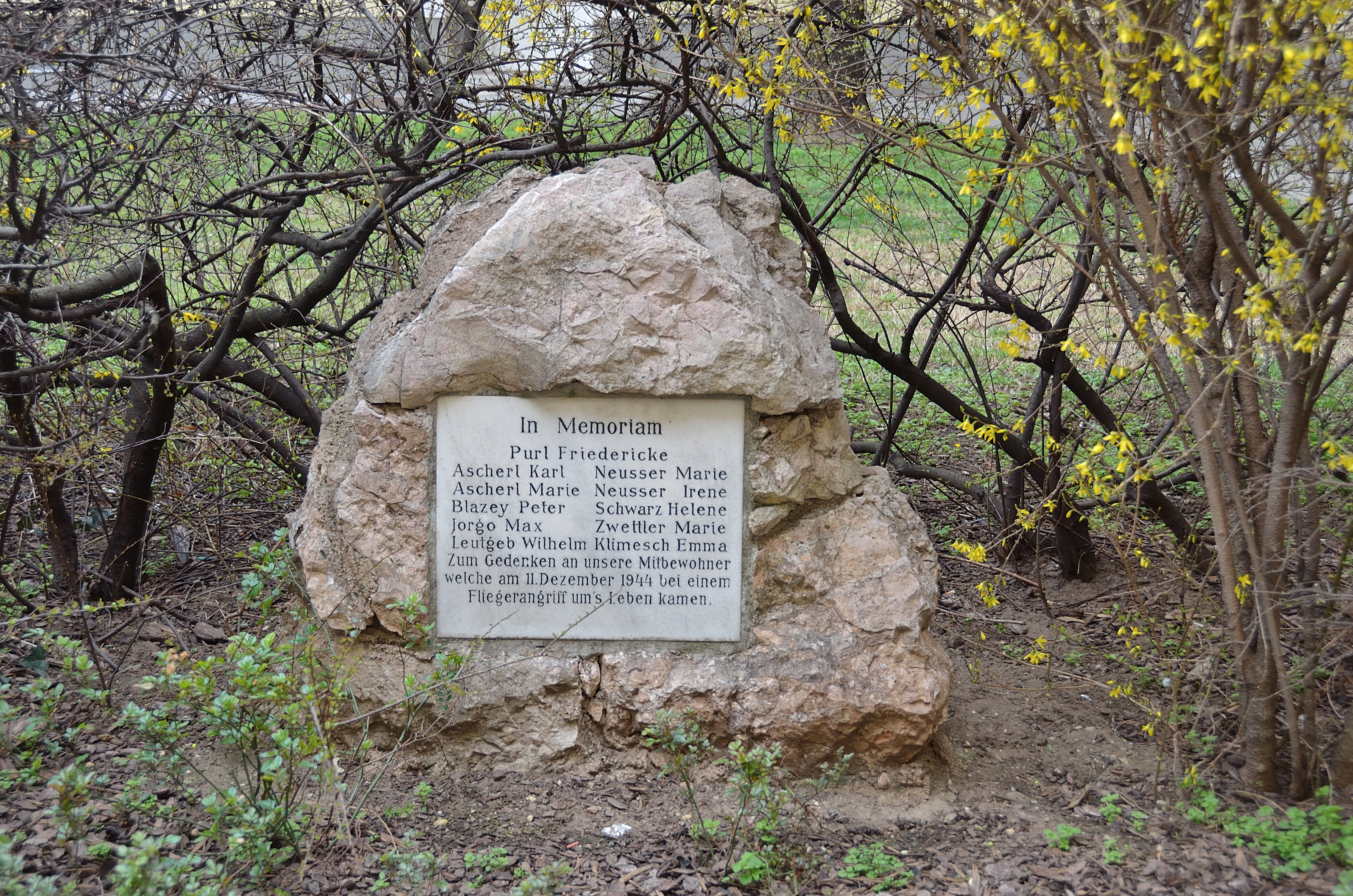 Gedenkstein für die Todesopfer des Bombenangriffs vom 11. Dezember 1944 im Karl-Höger-Hof in der Lorystraße 40-42 in Wien Simmering.